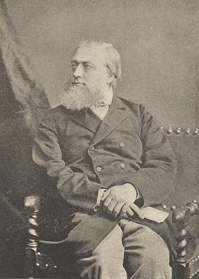 Samuel Danks Waddy (1830-1902)